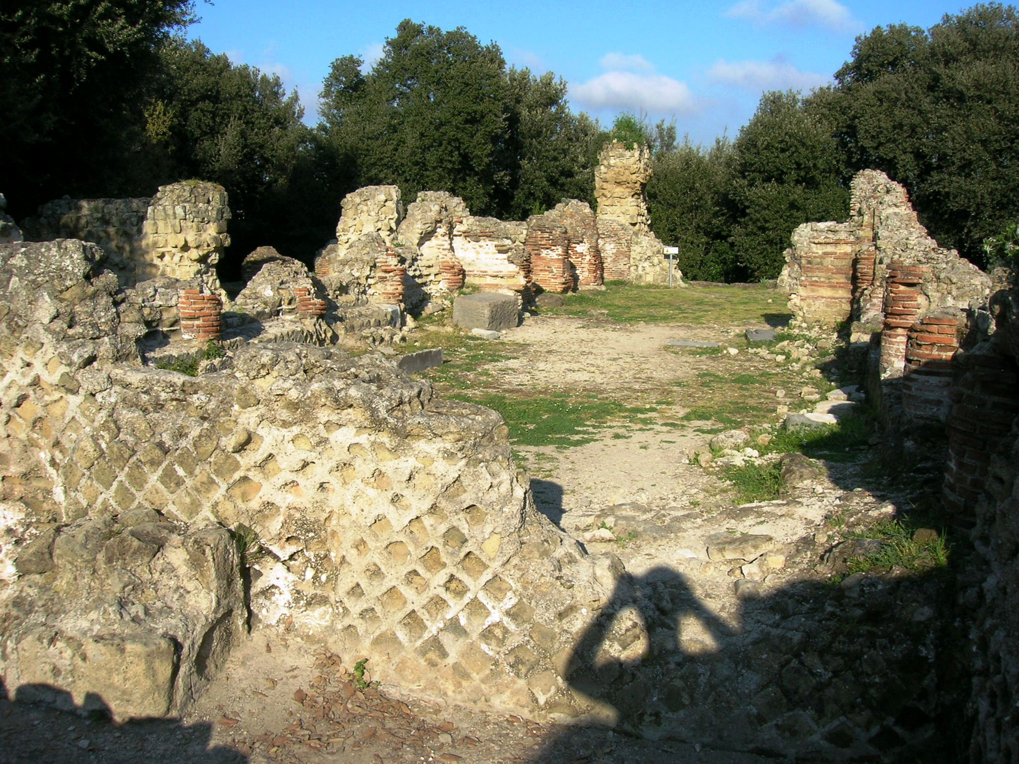 Tempio di Giove a Cuma